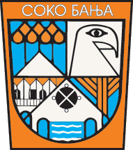 Das Wappen der Stadt und Gemeinde Sokobanja